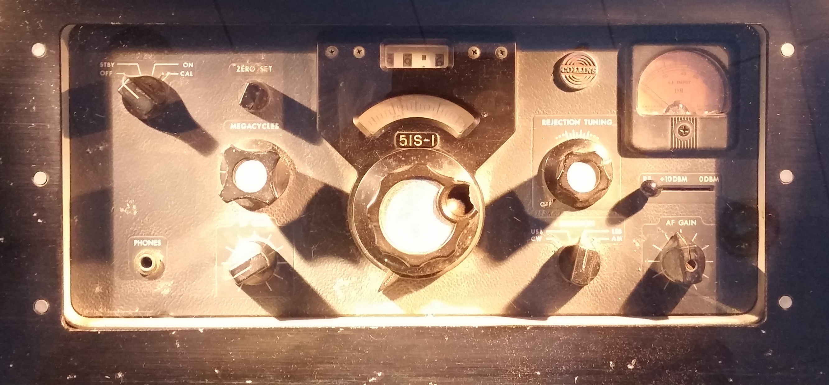 ציוד האזנה לשיחת הטלפון נאצר חוסיין